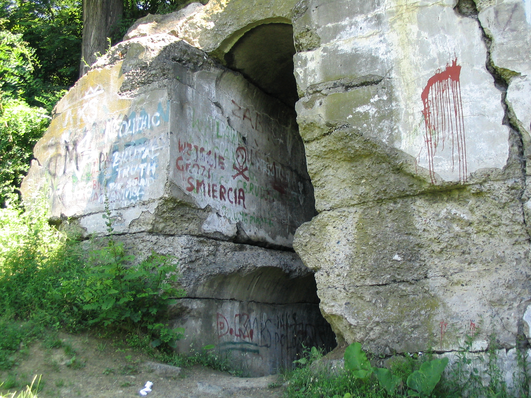 Fort XIII "San Rideau" Autor: Goku122